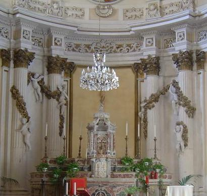 Church Messina Chiesa di Sant'Elia